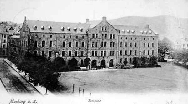 Alte Jägerkaserne in Marburg (erbaut 1868-69), heute Psychologisches Institut der Philipps-Universität, Gutenbergstraße 18, Ansicht von SW